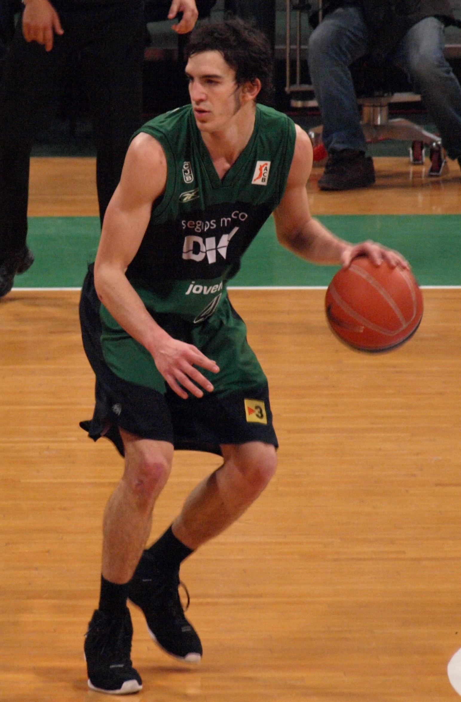 Pau Ribas, en el partido que enfrentó al DKV Joventut y al FC Barcelona de liga ACB en el Olímpico de Badalona en enero de 2009.